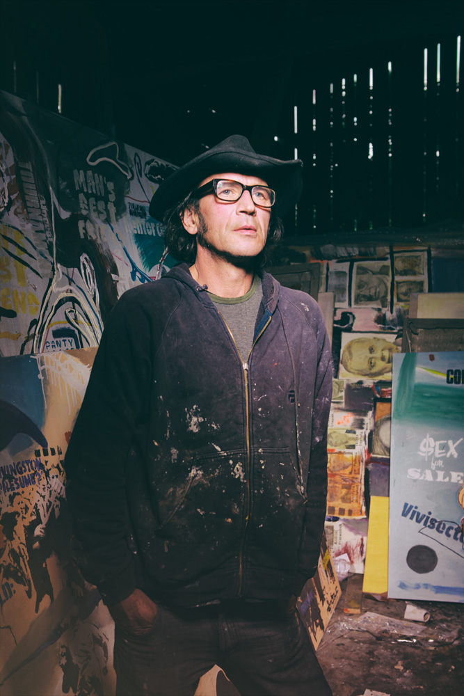 Andrzej Cisowski - malarz